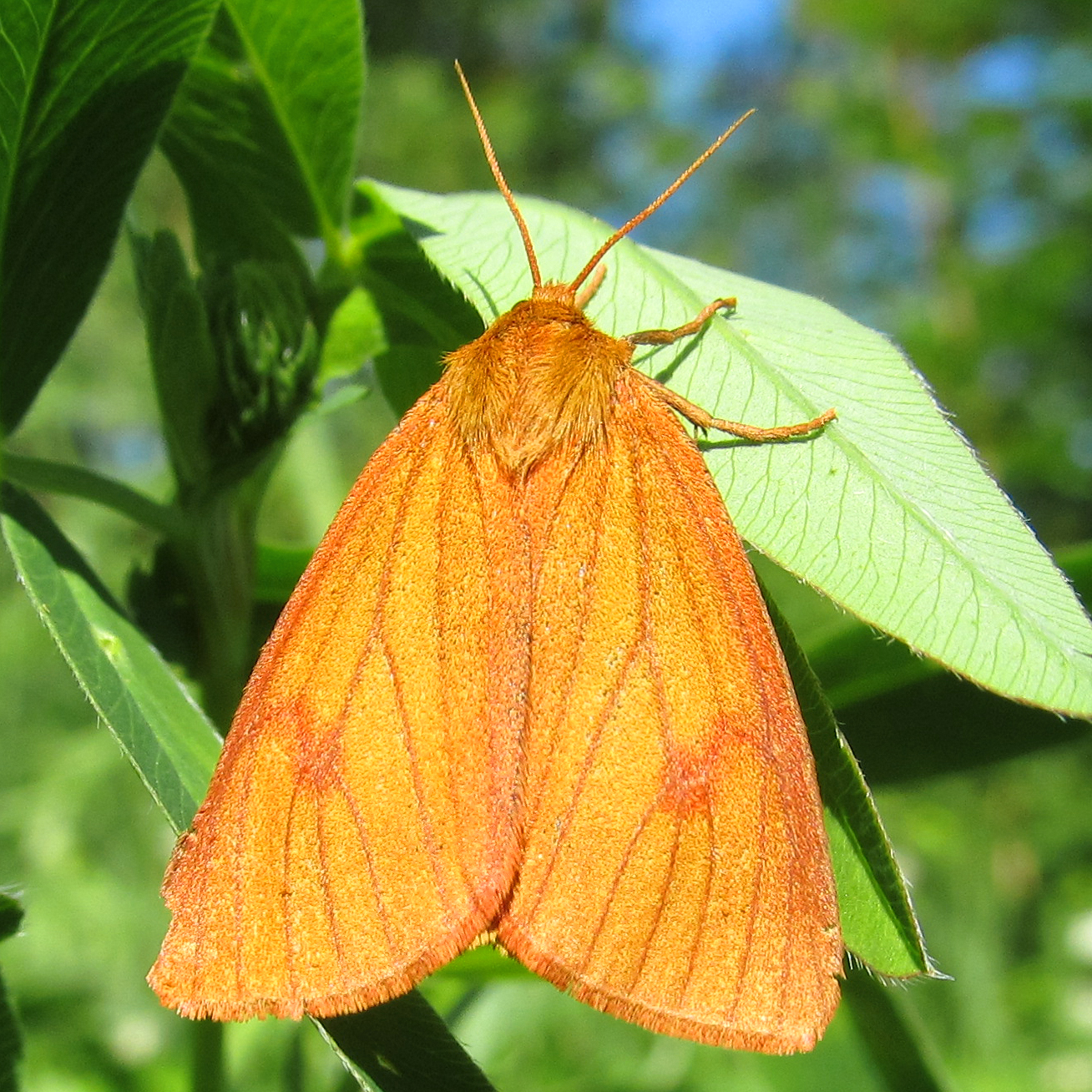 Diacrisia sannio. Медведица луговая или медведица-скоморох под Санкт Петербургом. Самка.